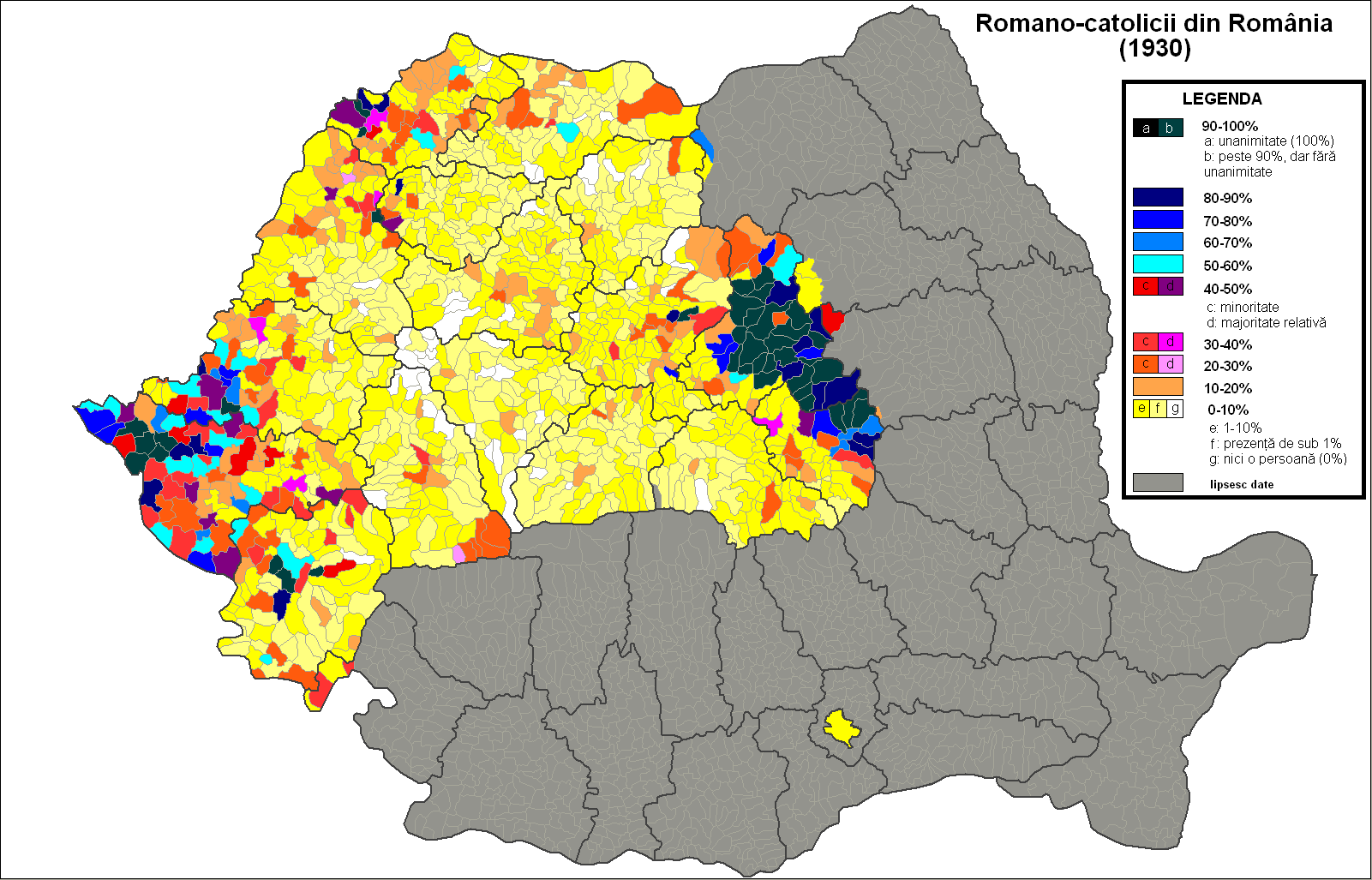 Distibuţia romano-catolicilor în România conform recensământului din 1930. Harta reprezintă frontierele actuale, precum şi limitele administrative actuale: judeţe, comune, oraşe. Nu sunt reprezentate în hartă romano-catolicii din Bucovina şi Drobrogea, care alcătuiau o parte din populaţia germană din aceste regiuni, romano-catolicii polonezi din Bucovina, romano-catolicii maghiari/ceangăi din Moldova, romano-catolicii italieni din Drobrogea, bulgarii pavlicheni din Popeşti-Leordeni.